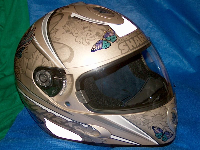 Motorbike helmet (Shark S800 Butterfly)